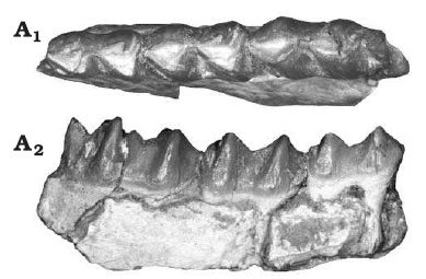 Hemimandible of tragulid ruminant Afrotragulus moruorotensis (Pickford, 2001), Moruorot, late early Miocene of Kenya.